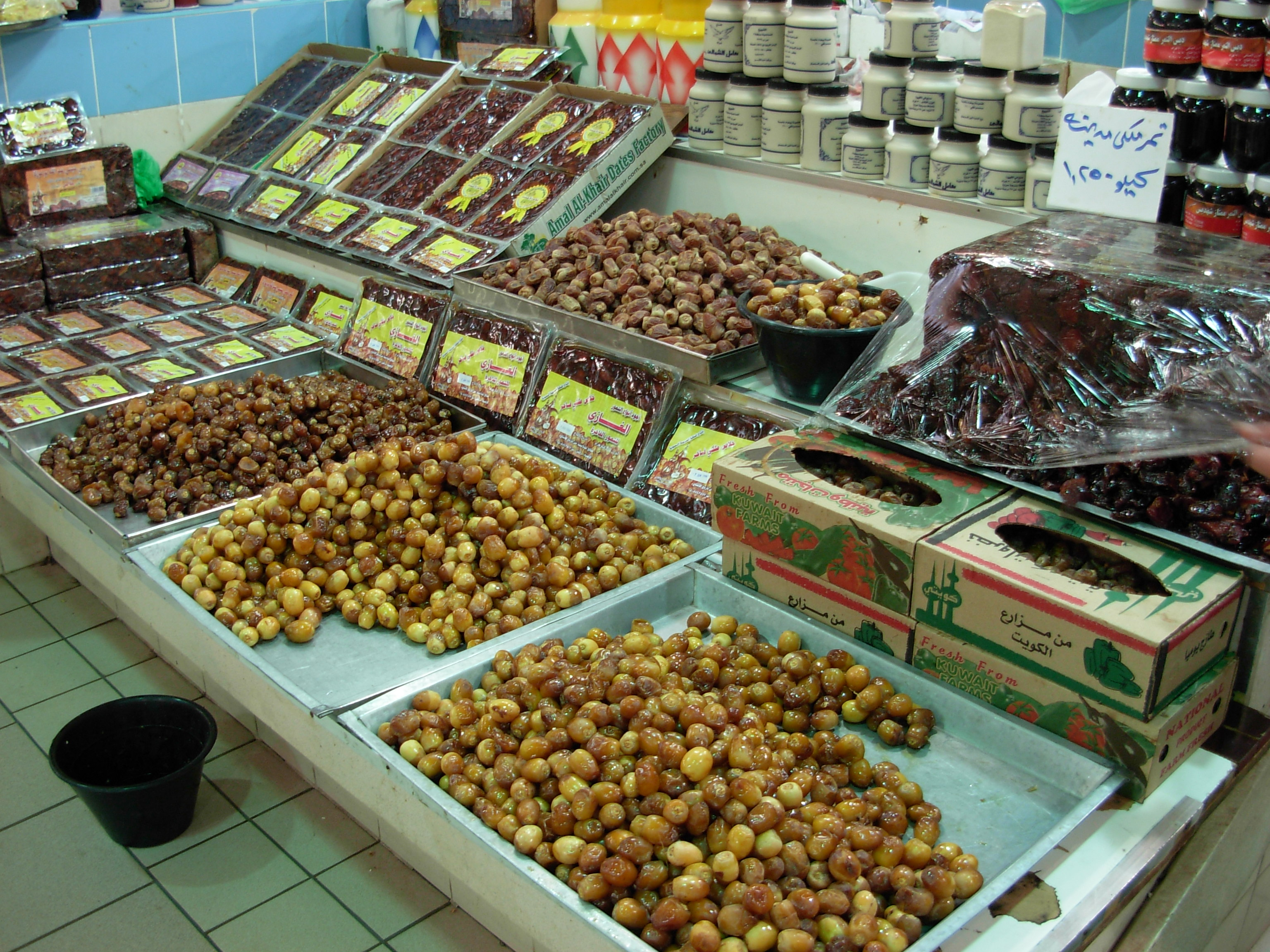 കുവൈറ്റിലെ ഒരു ഈന്തപ്പഴക്കട. വിവിധ തരത്തിലുള്ള ഈന്തപ്പഴങ്ങളും ഈന്തപ്പഴം കൊണ്ട് ഉണ്ടാക്കിയ മറ്റ് വിഭവങ്ങളും.